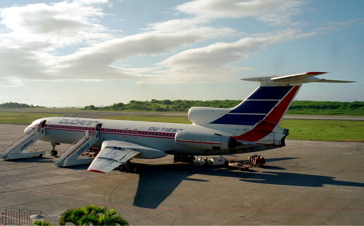 Cubana Tupolev Tu-154B-2 at Santiago de Cuba Airport